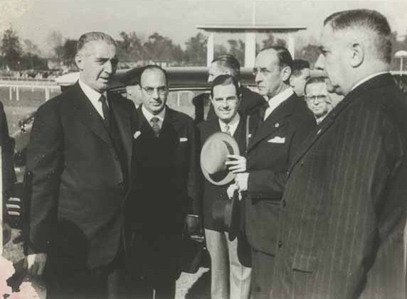 Juan Antonio Ríos visita el Club Hípico